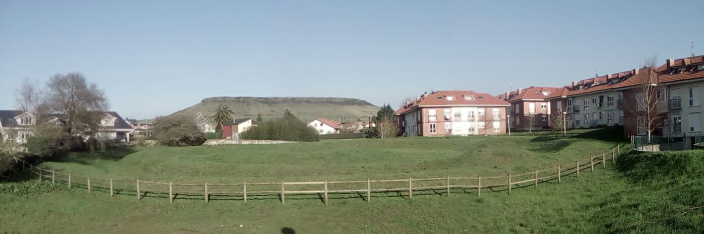 Mota de Trespalacios o Tres Palacios en Hinojedo (Cantabria, España).